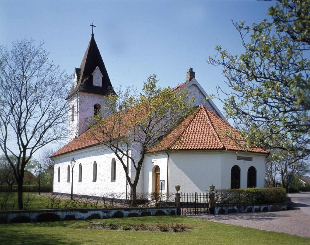 Kärråkra kyrka